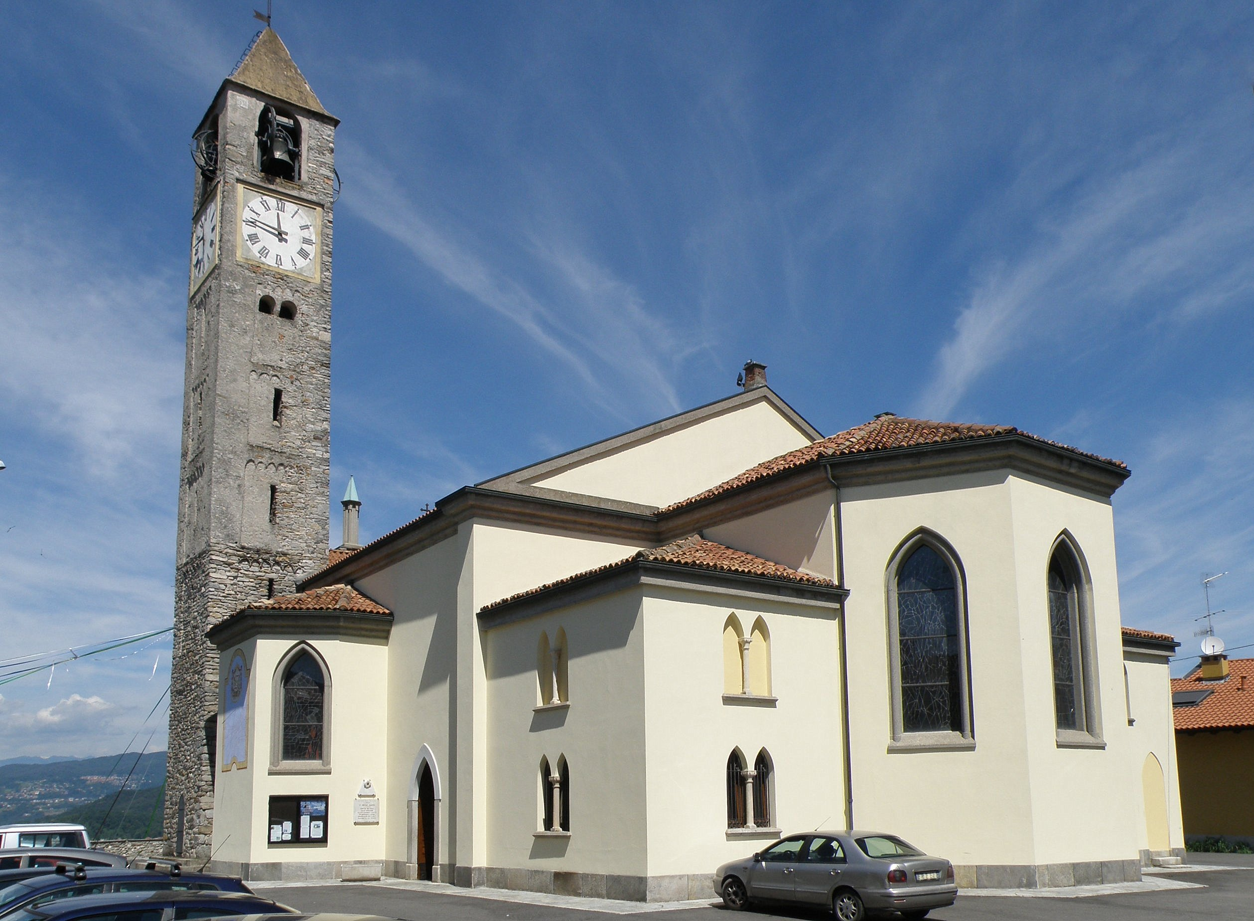 Taino (VA). Chiesa parrocchiale di Santo Stefano Protomartire.